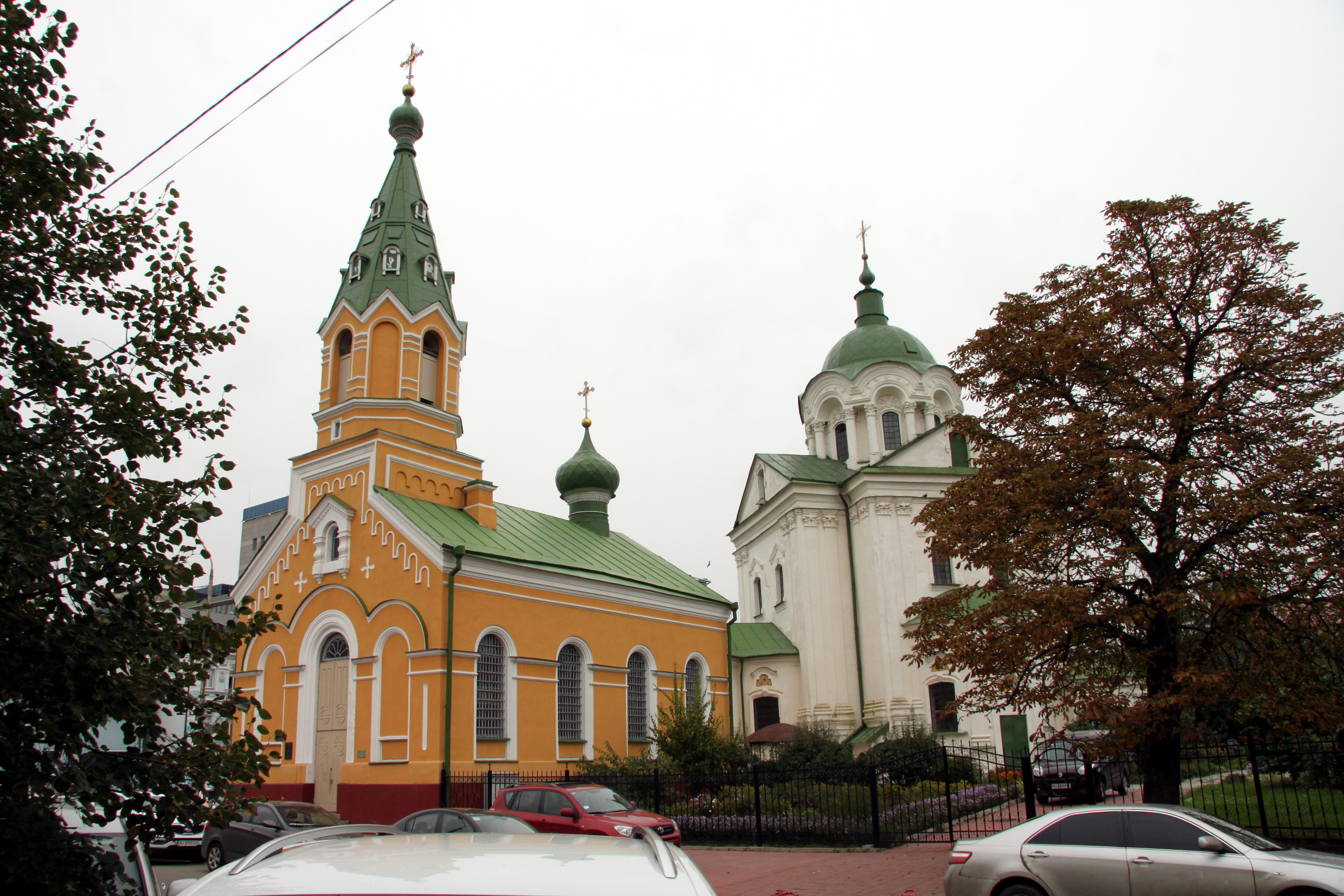 Церква Миколи Набережного і дзвіниця, Київ, Сковороди Григорія вул., 12/4